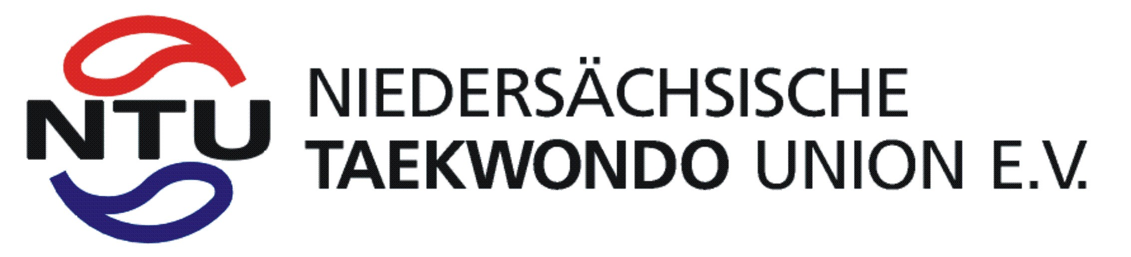 NTU-Logo mit Schriftzug, bereitgestellt von der NTU e.V.